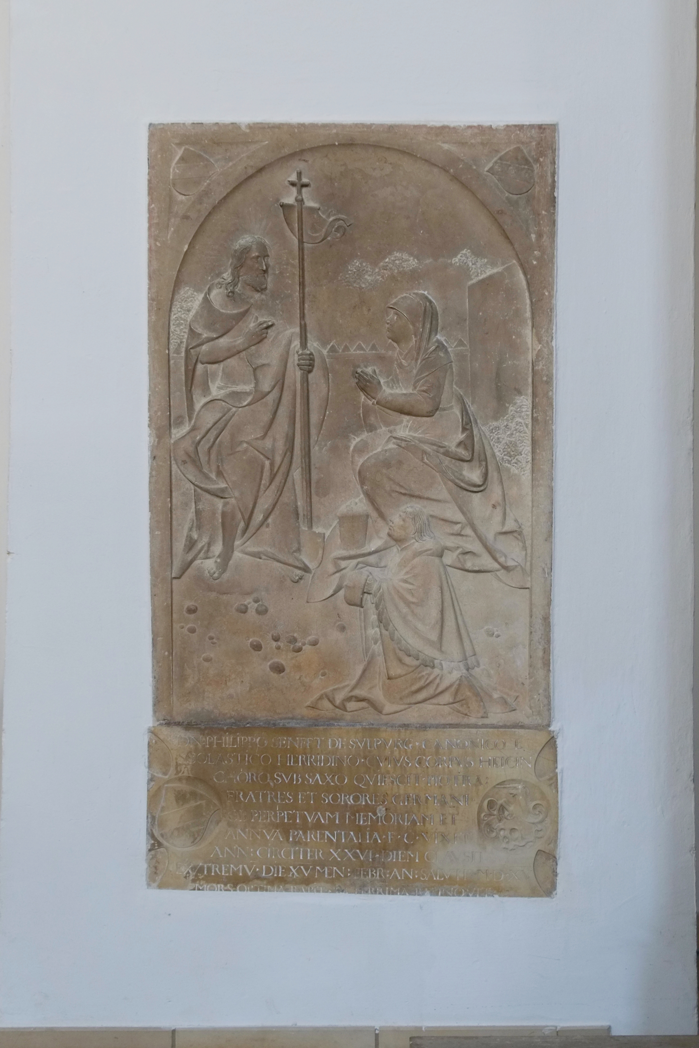 Epitaph für Philipp Senfft von Sulpurg in der Augustinuskirche in Schwäbisch Gmünd (Baden-Württemberg, Deutschland)